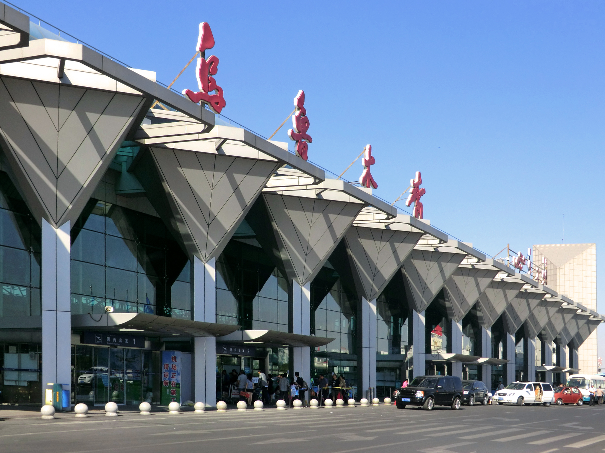 urumqi airport